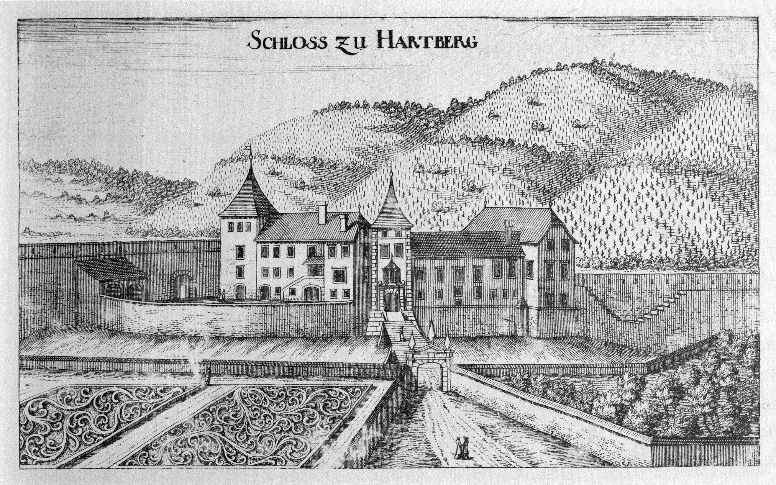 G. M. Vischers Käyserlichen Geographi, Topographia Ducatus Stiriae, Das ist: Eigentliche Delineation / und Abbildung aller Städte / Schlösser / Marcktfleck / Lustgärten / Probsteyen / Stiffter / Clöster und Kirchen / so es sich im Herzogthumb Steyrmarck befinden; Und anjetzo Umb einen billichen Preyß zu finden seynd Bey Johann Bitsch Universitäts Buchhandlern / Auff dem Juden=Platz bey der guldenen Saulen. Graz 1681 Die Nummerierung der Dateien folgt der alphabetischen Reihung der Ortsnamen